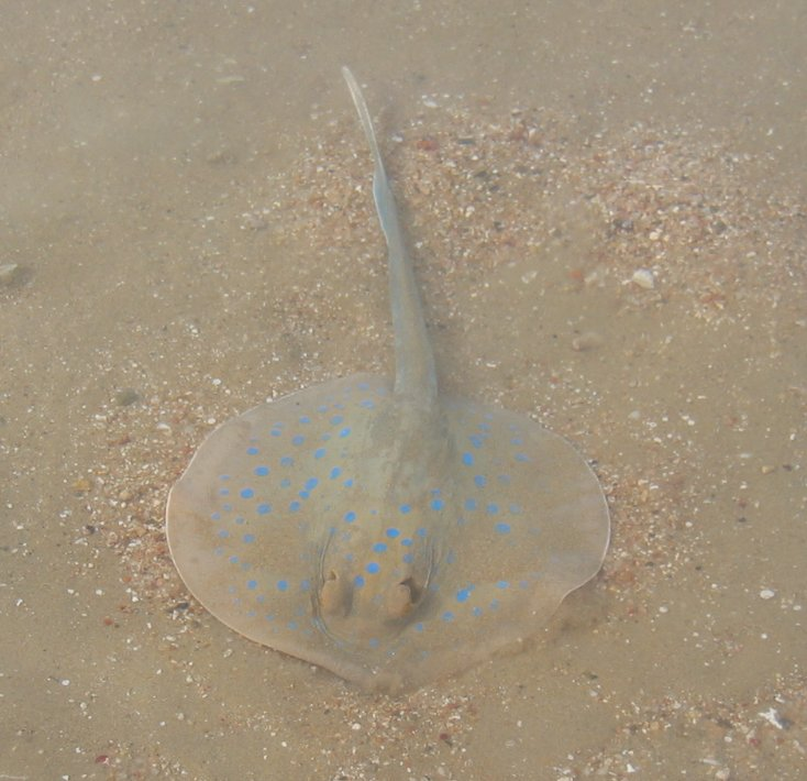 A Taeniura lymma in Egypt